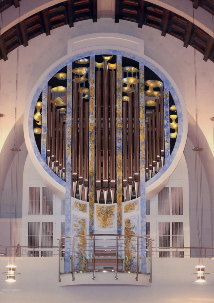 Ansicht der Vleugels-Orgel in der Pfarrkirche St. Fidelis in Stuttgart